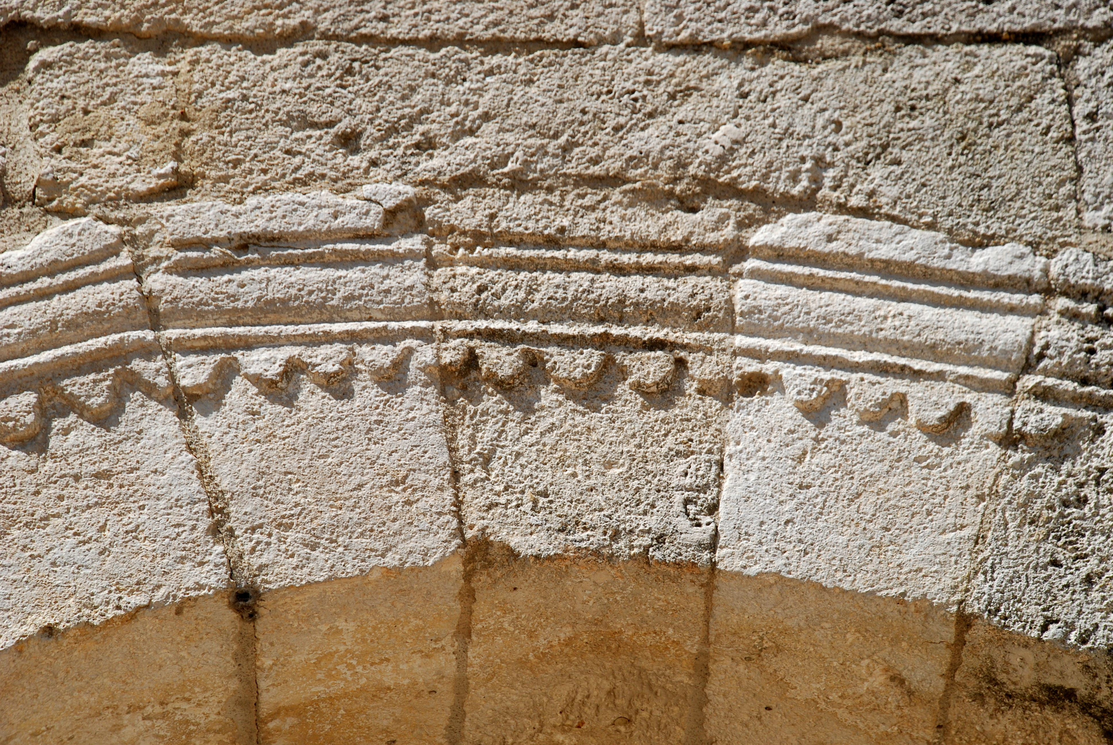 France - Gard - Chapelle Saint-Amand de Théziers